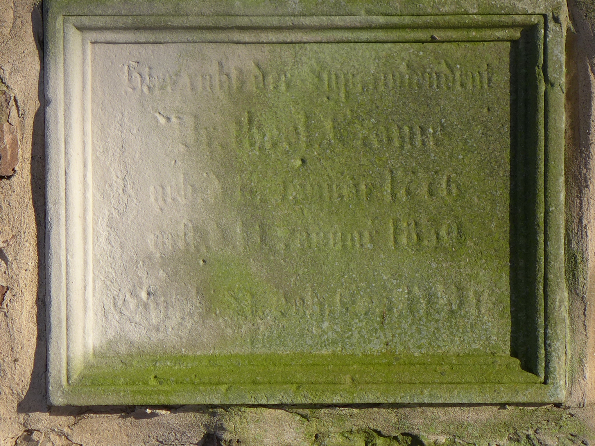 Hier ruht der Superintendent Dr. theol. Crome - Inschrift an der Kirchhofmauer der Martinskirche in Markoldendorf